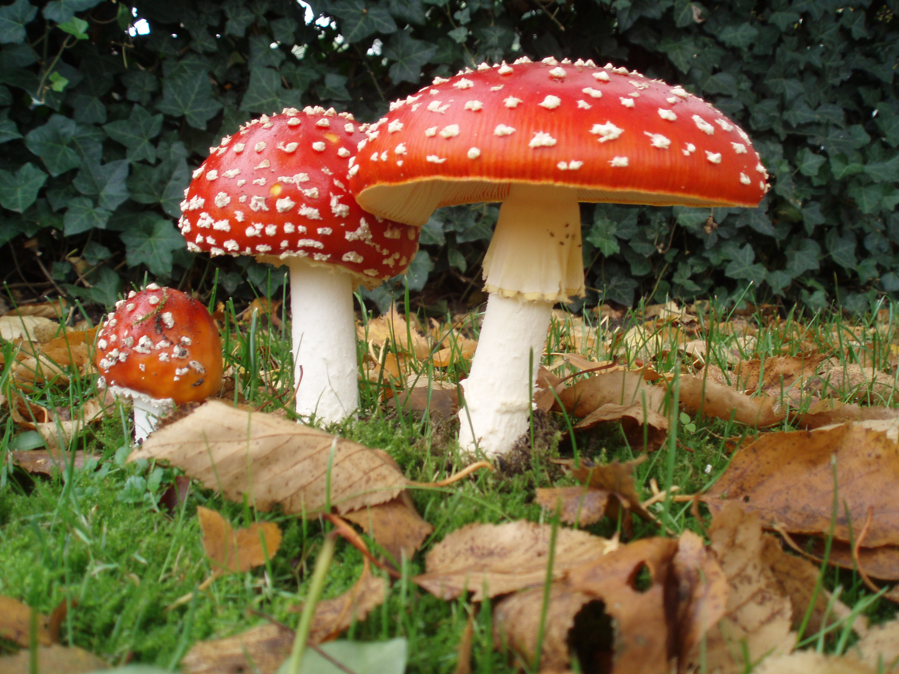 Drie vliegenzwammen op rij in de wijk Dieze-Oost in Zwolle.